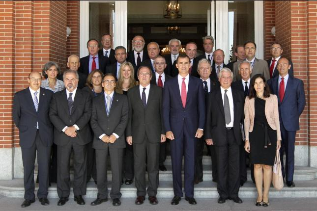 Patronato de la Biblioteca Virtual en Palacio de la Zarzuela